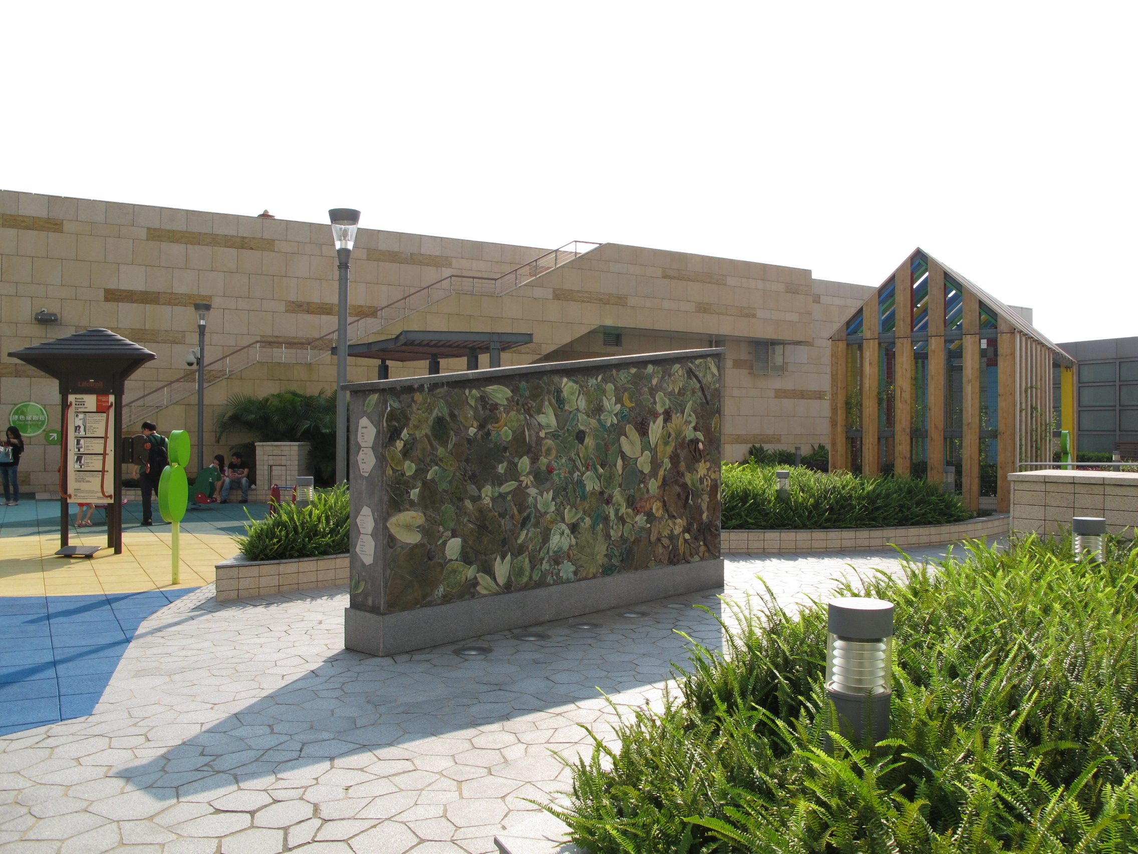 Domain, Hong Kong Roof Garden view